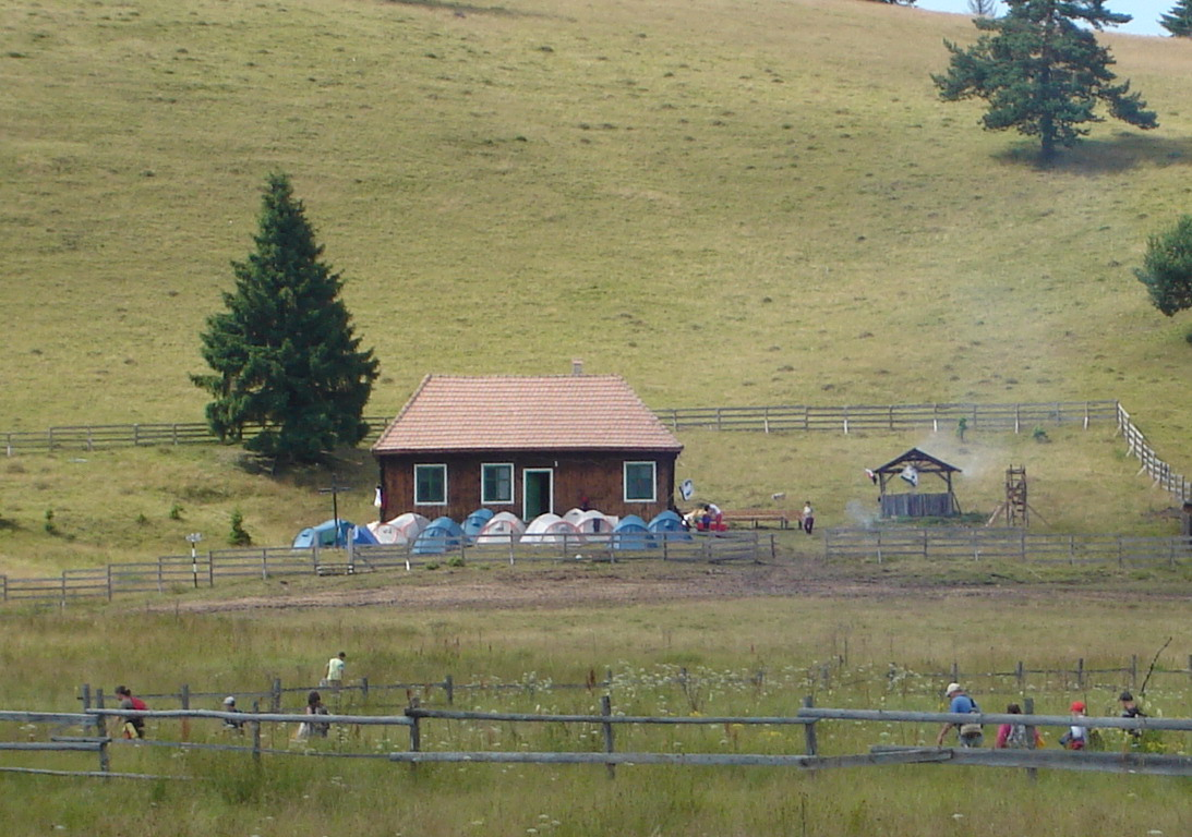 Csángótelepi(Gyertyános) Iskola, Erdély